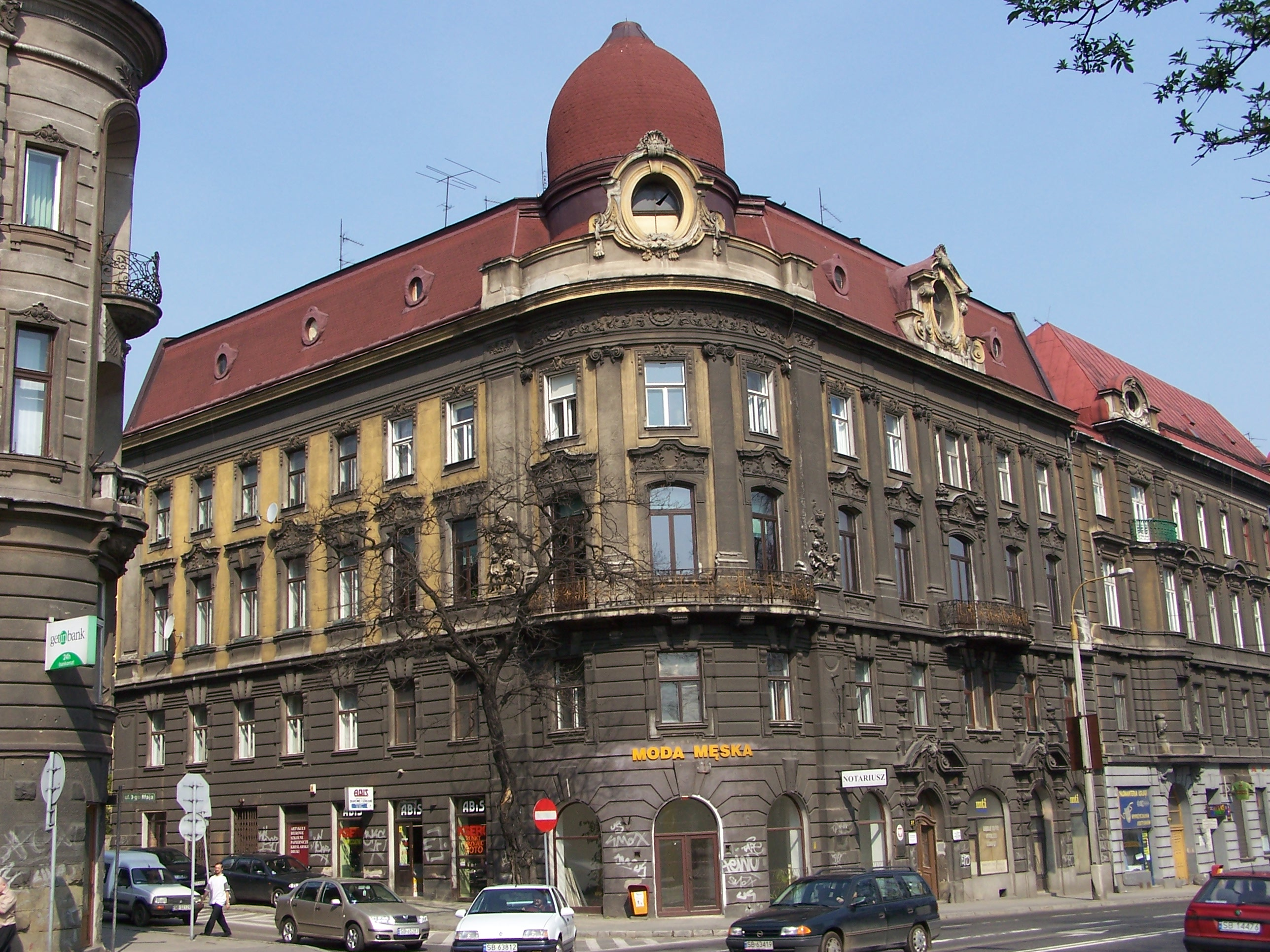 Kamienica narożna w Bielsku-Białej.